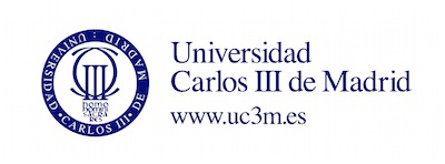 Escudo logo comunicacional de la Universidad Carlos III de Madrid